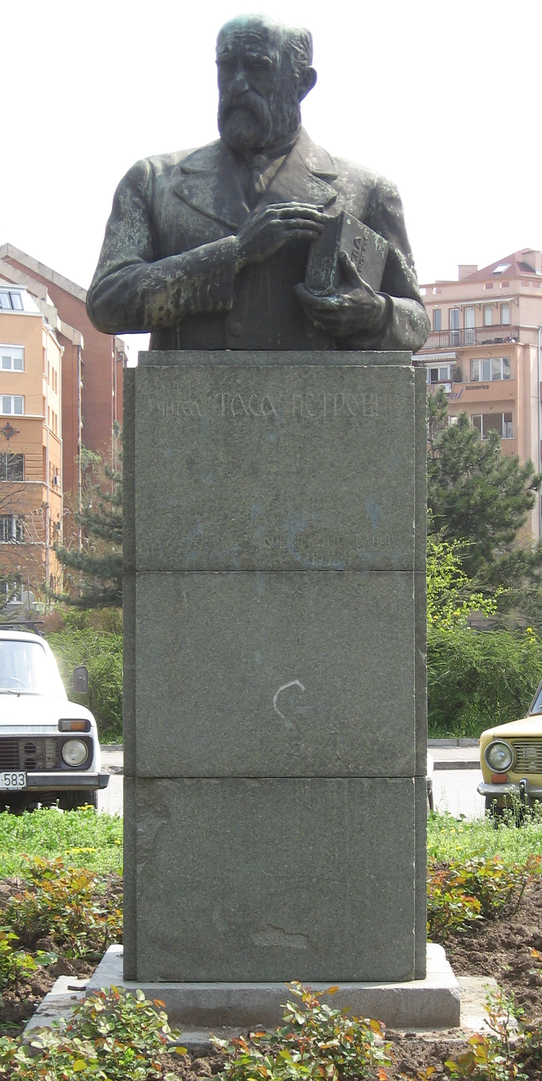 Spomenik Atanasiju Petroviću, poznatom kao Učitelj Tasa, ispred istoimene osnovne škole na istoimenom trgu